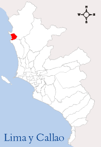 Localización del Distrito de Santa Rosa